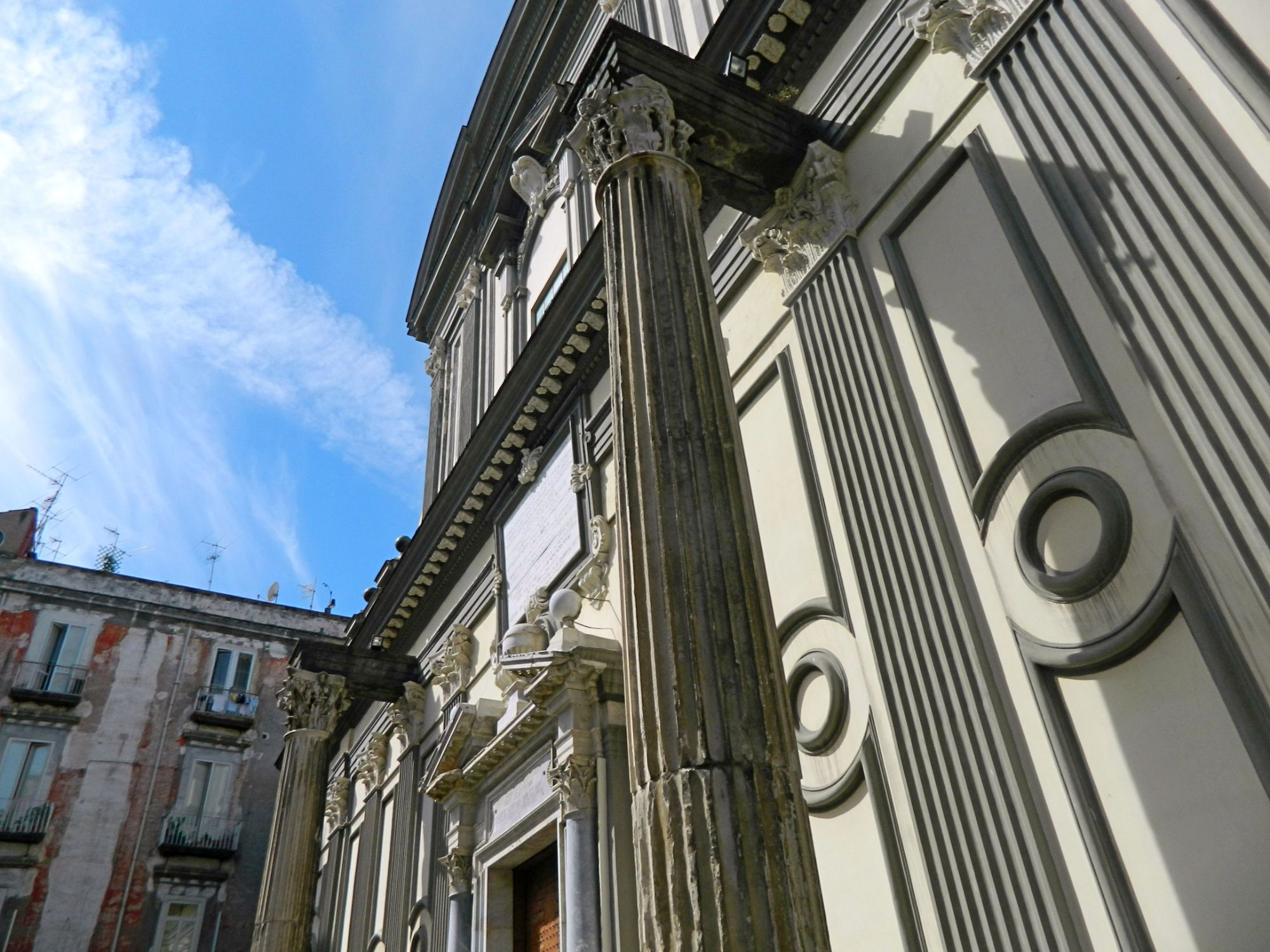 San Paolo Maggiore (particolare facciata) - Napoli. Capitello corinzio di spoglio dal Tempio dei Dioscuri.